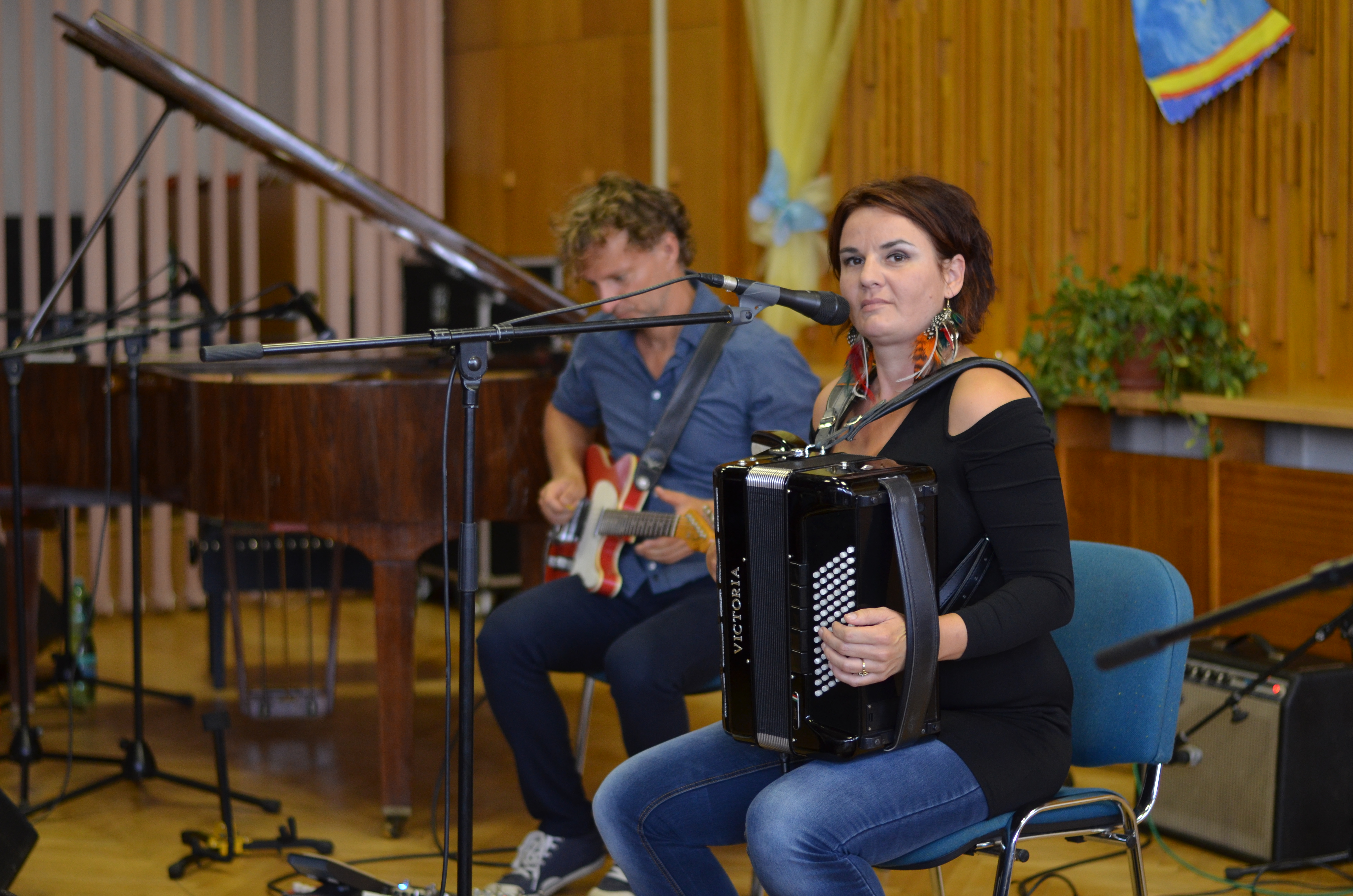 Radůza na koncertě v adamovském Městském kulturním středisku